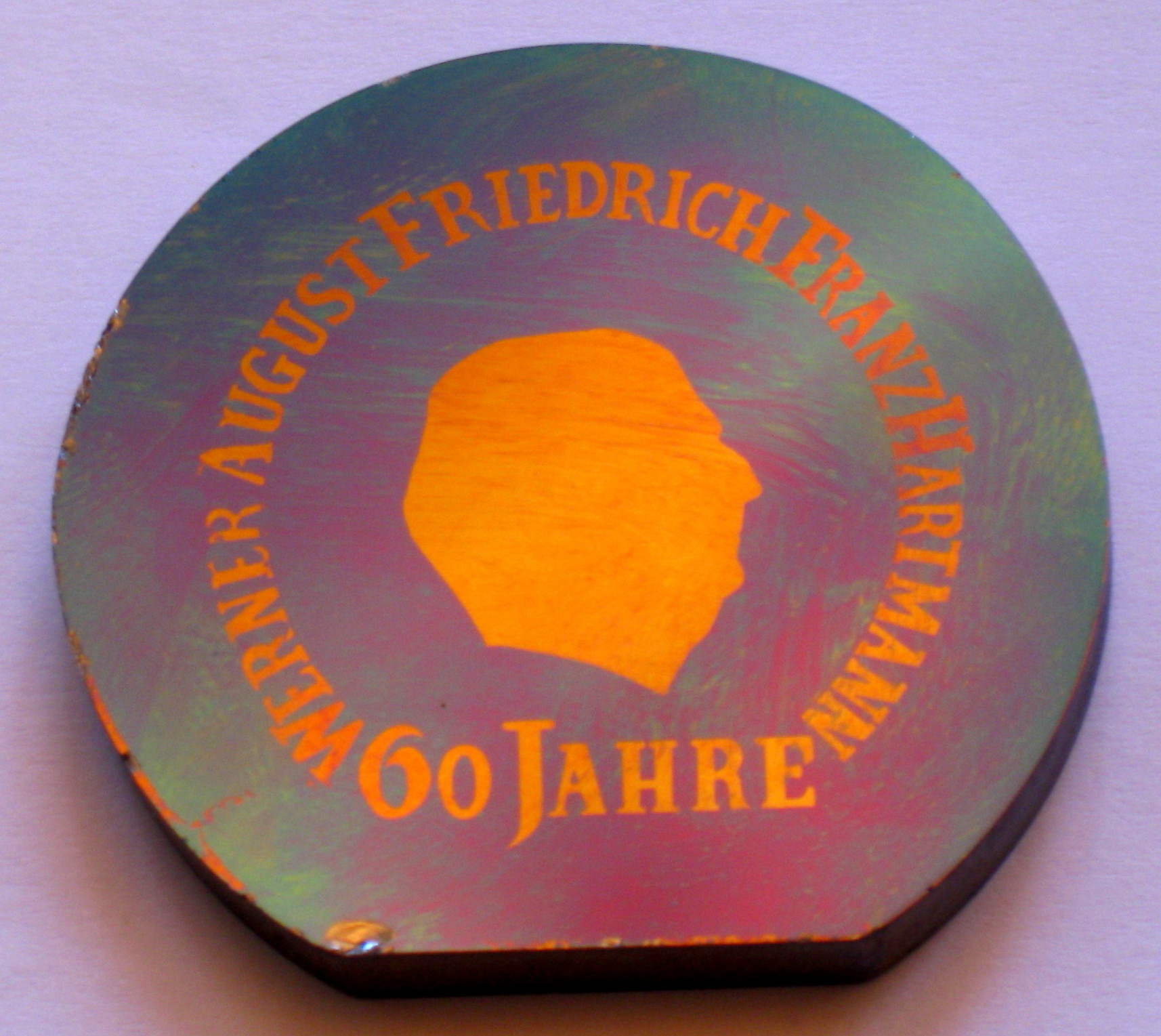 Medaille in Form einer Siliziumscheibe (Wafer) mit einer Widmung zum 60. Geburtstag von Prof. Dr.-Ing. Werner Hartmann. Die Widmung wurde gemäß der Schablone von Bild WernerHartmann-60-Scherenschnitt-mitRing.jpg auf fotolithographischem Wege präpariert.